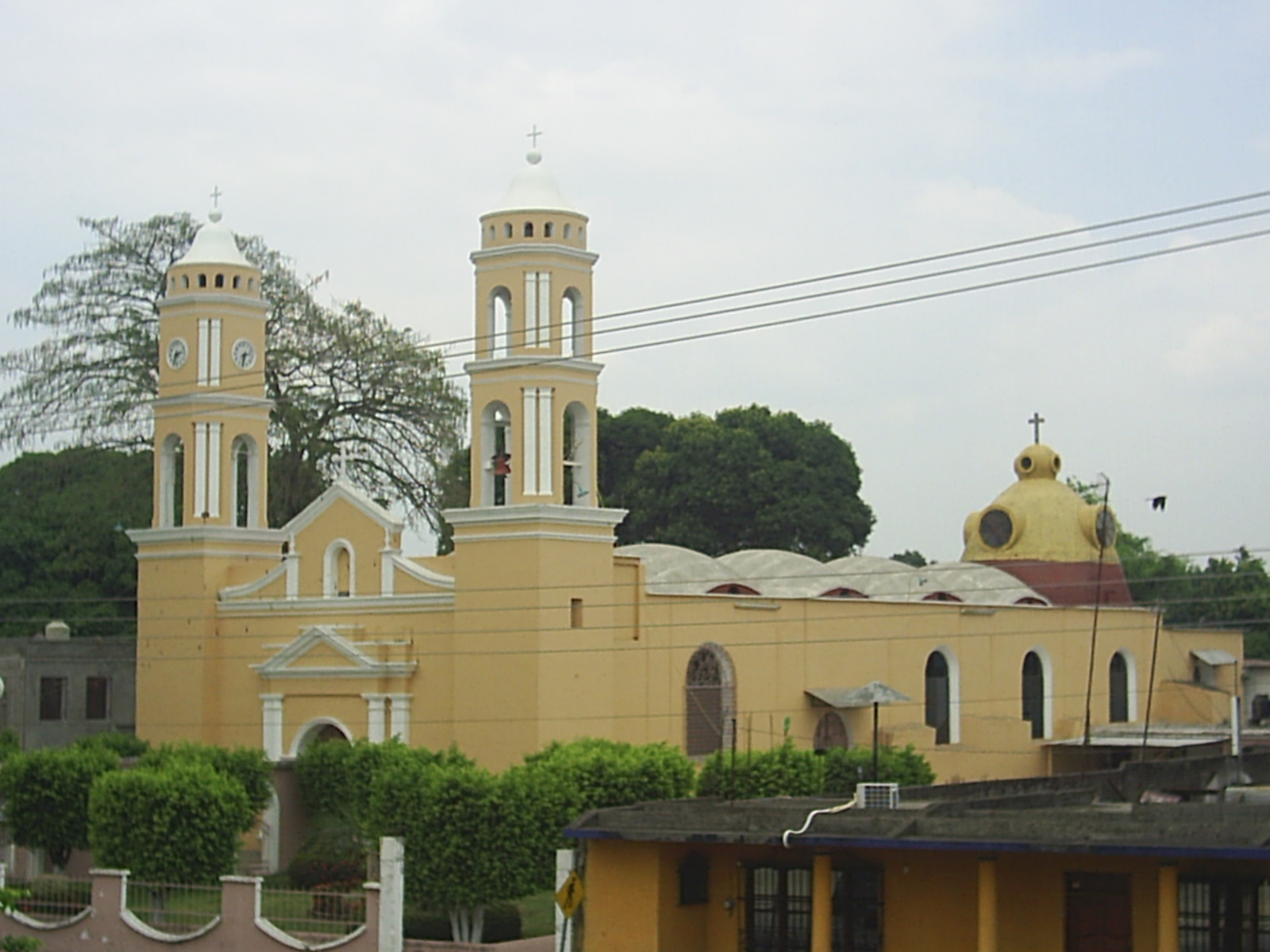 Former Catedral de Tuxtepec